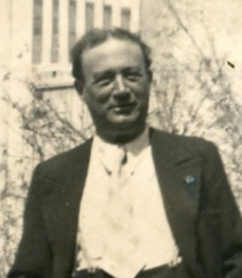 immagine in borghese di Gaetano Canelles